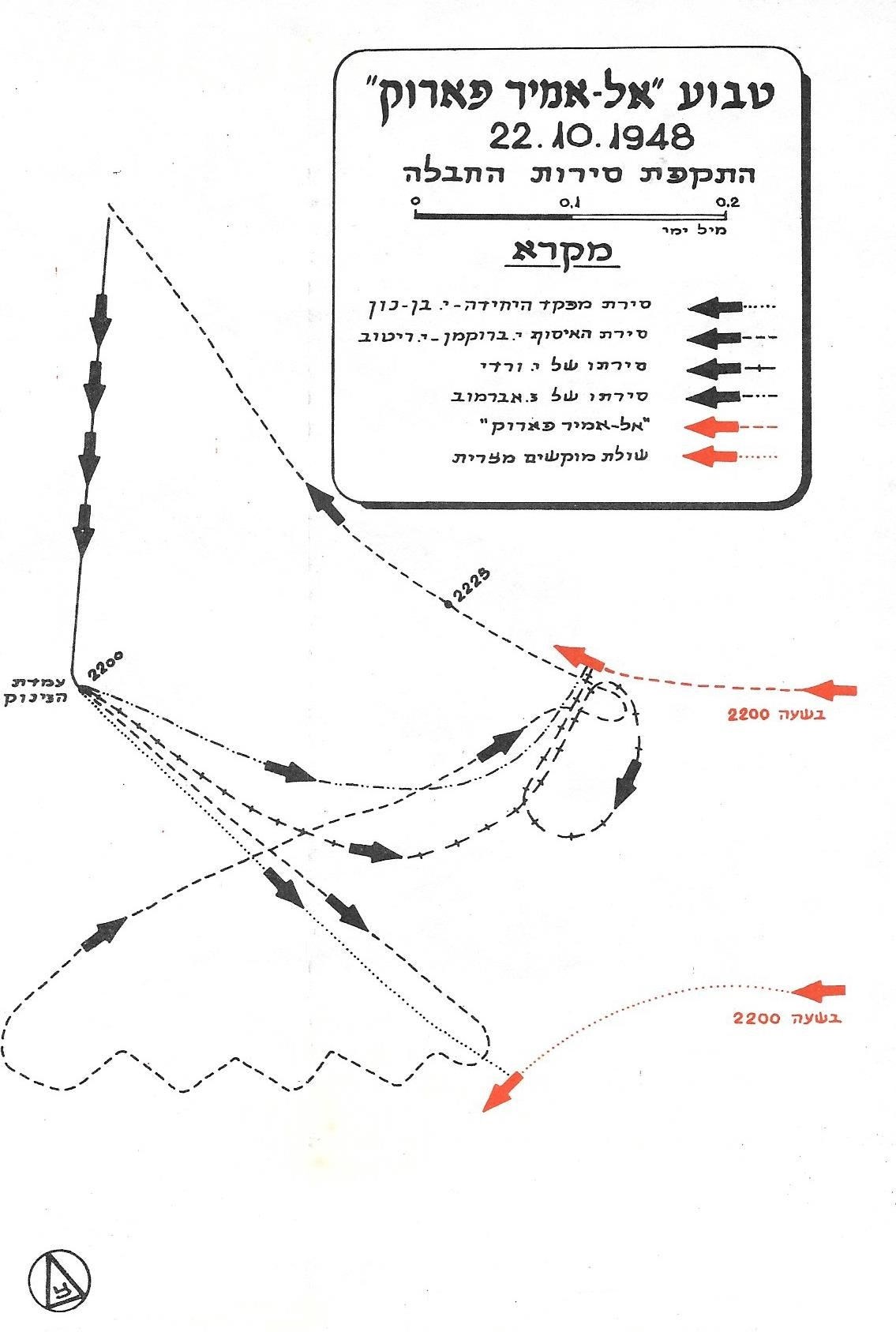 היערכות סירות הנפץ לפגיעה בהאמיר פארוק ושולת מוקשים מצרית 22 אוקטובר 1948